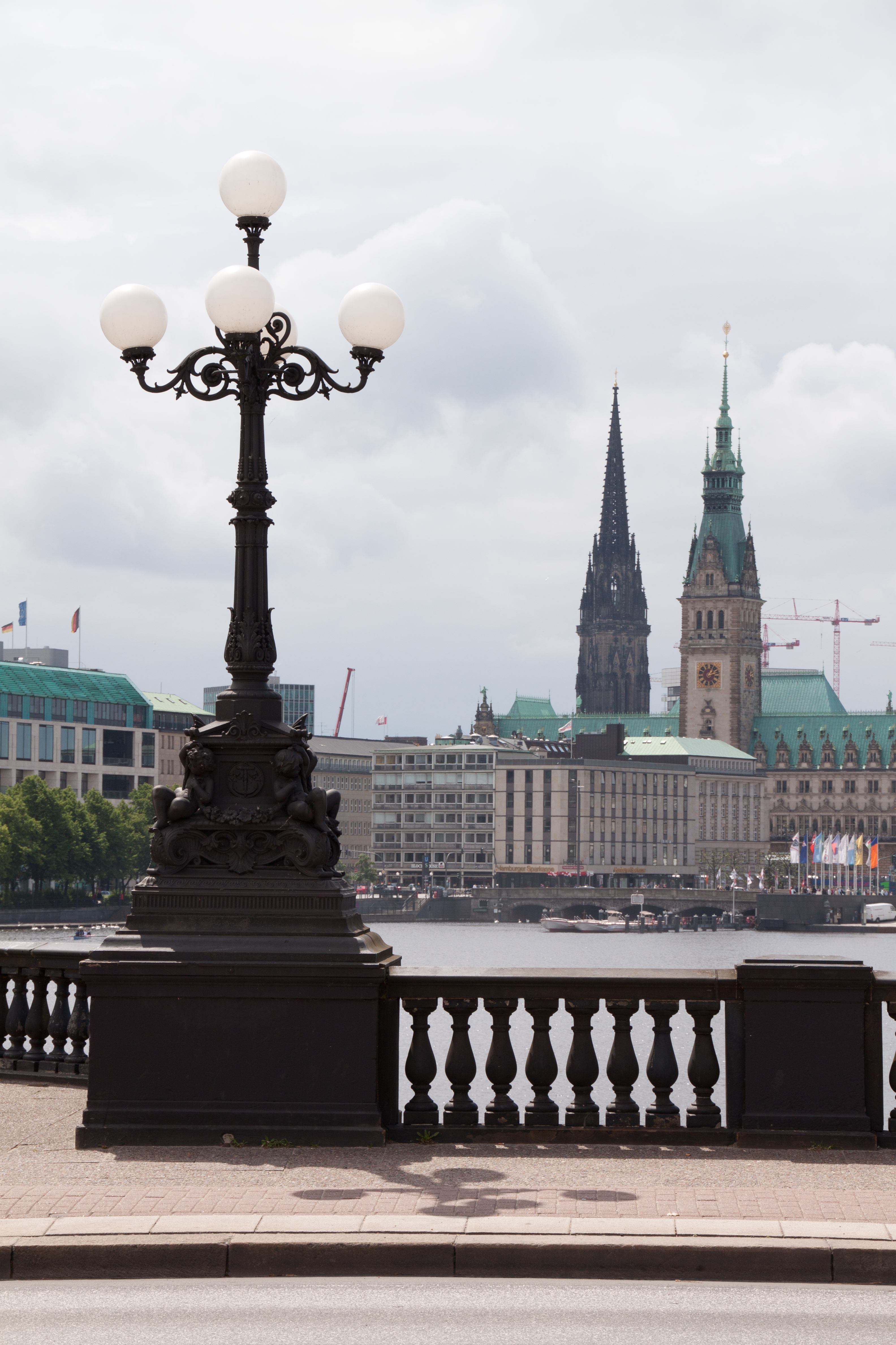 Lombardsbrücke